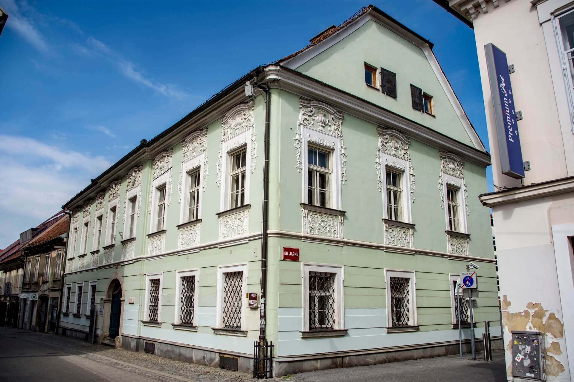 Slika Salzburškega dvorca